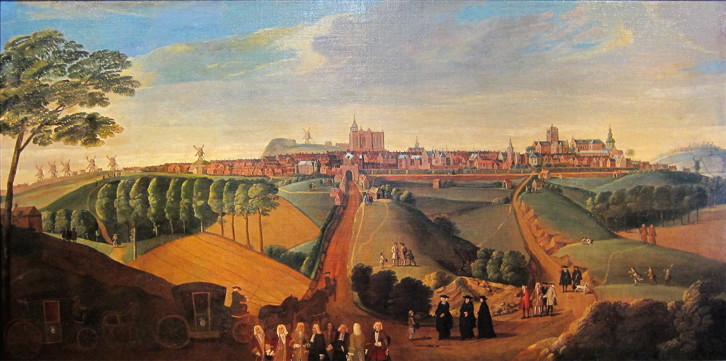 Vue panoramique de Cassellabel QS:Lfr,"Vue panoramique de Cassel"